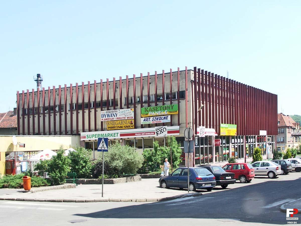 Pawilon handlowy. Porównanie ze zdjęciem pokazuje jak kolor może odmienić wygląd!